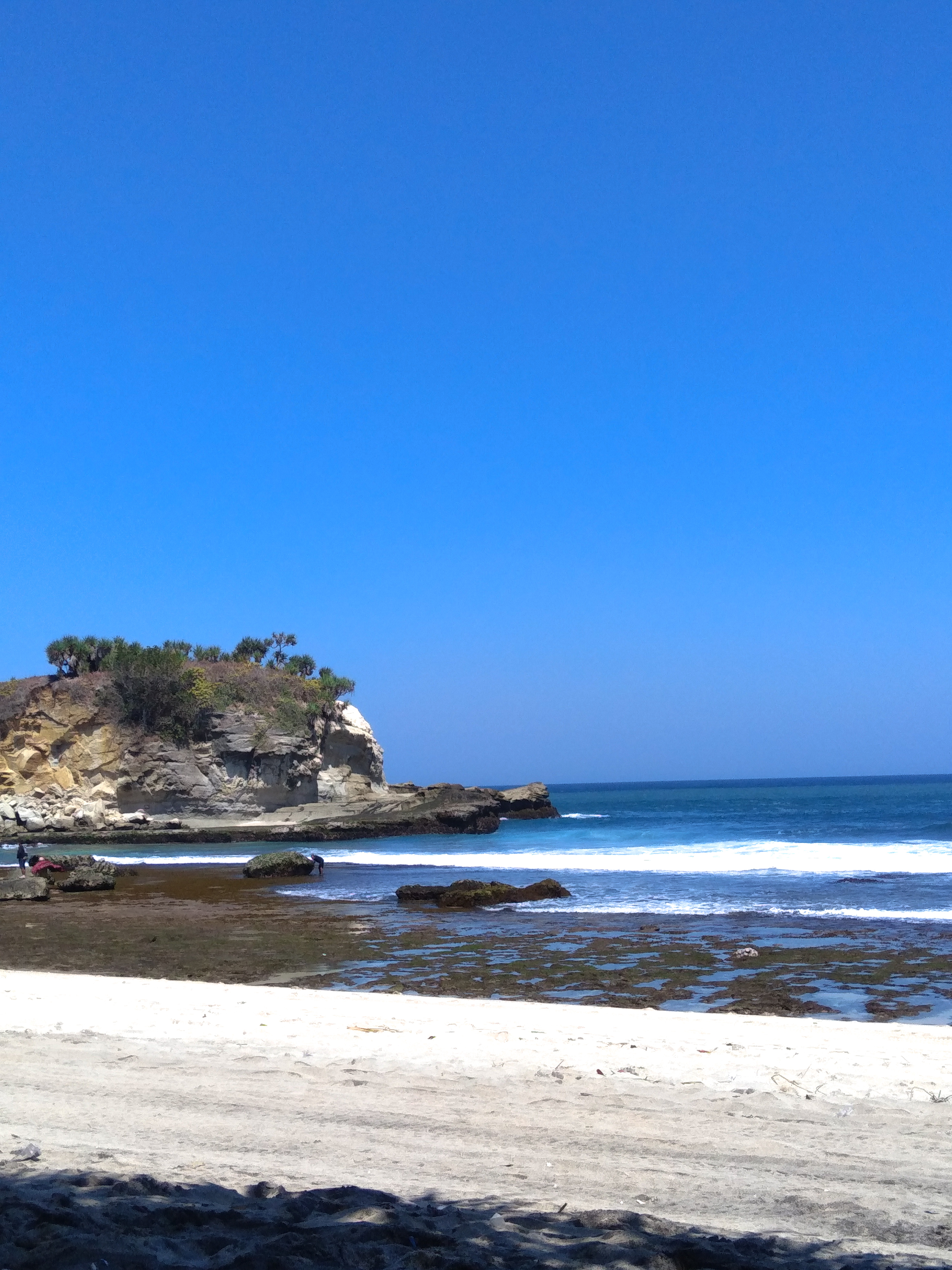 Pantai Klayar adalah sebuah pantai dengan pasir putih, batu karang, dan dikelilingi oleh tebing-tebing batu. Pantai ini terletak di Pacitan, Jawa Timur dan berbatasan dengan Wonogiri, Jawa Tengah.